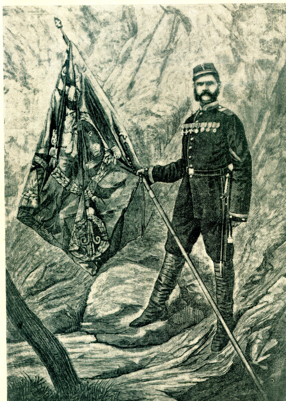 Прокопий Чумаченко знаменосец на 17-ти Архангелогородски пехотен полк, участник в Руско-турската война 1877-78 г. отличил се в боевете за Никопол, трите атаки на Плевен, пленяването на Осман паша и в сраженията при Пловдив.